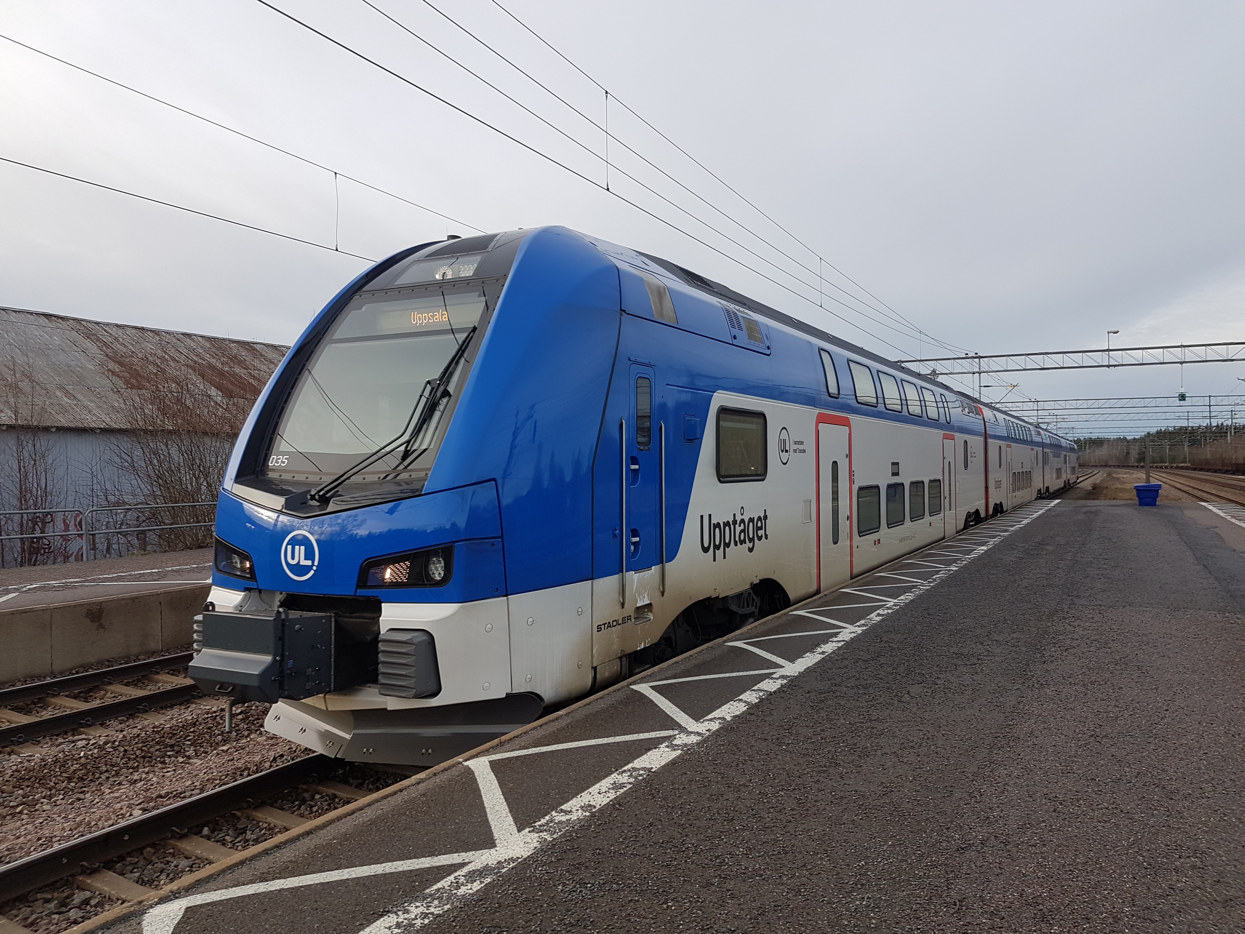 Ein neuer Upptåget-Zug fährt von Tierp kommend in den Bahnhof Örbyhus ein.